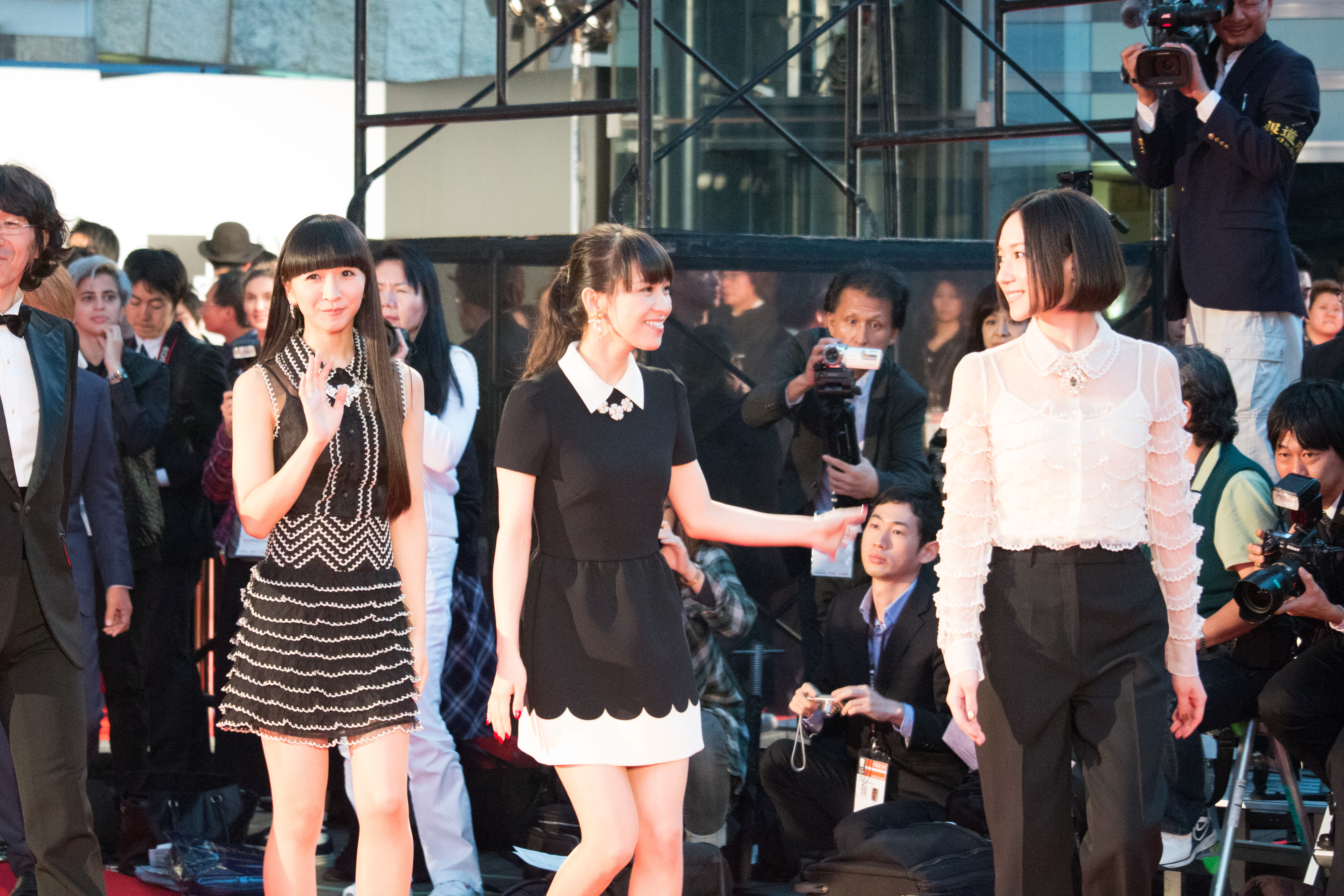 第28回 東京国際映画祭 オープニングセレモニー あ～ちゃん のっち かしゆか (Perfume) (We Are Perfume)